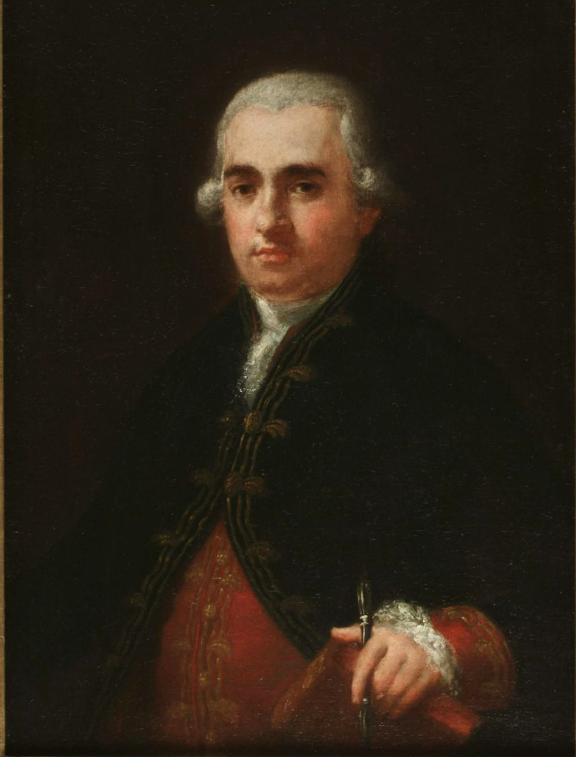 Retrato de Juan Agustín Ceán Bermúdez